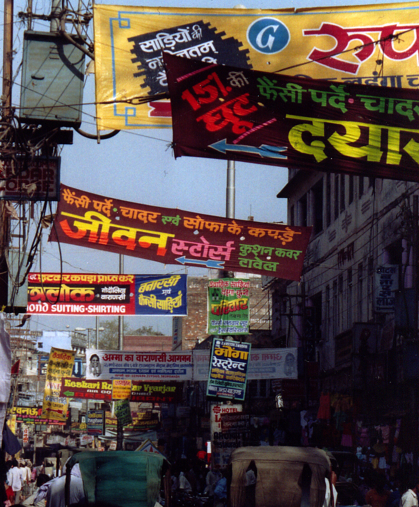 Straßenszene in Varanasi (Benares) mit Reklame in Devanagari